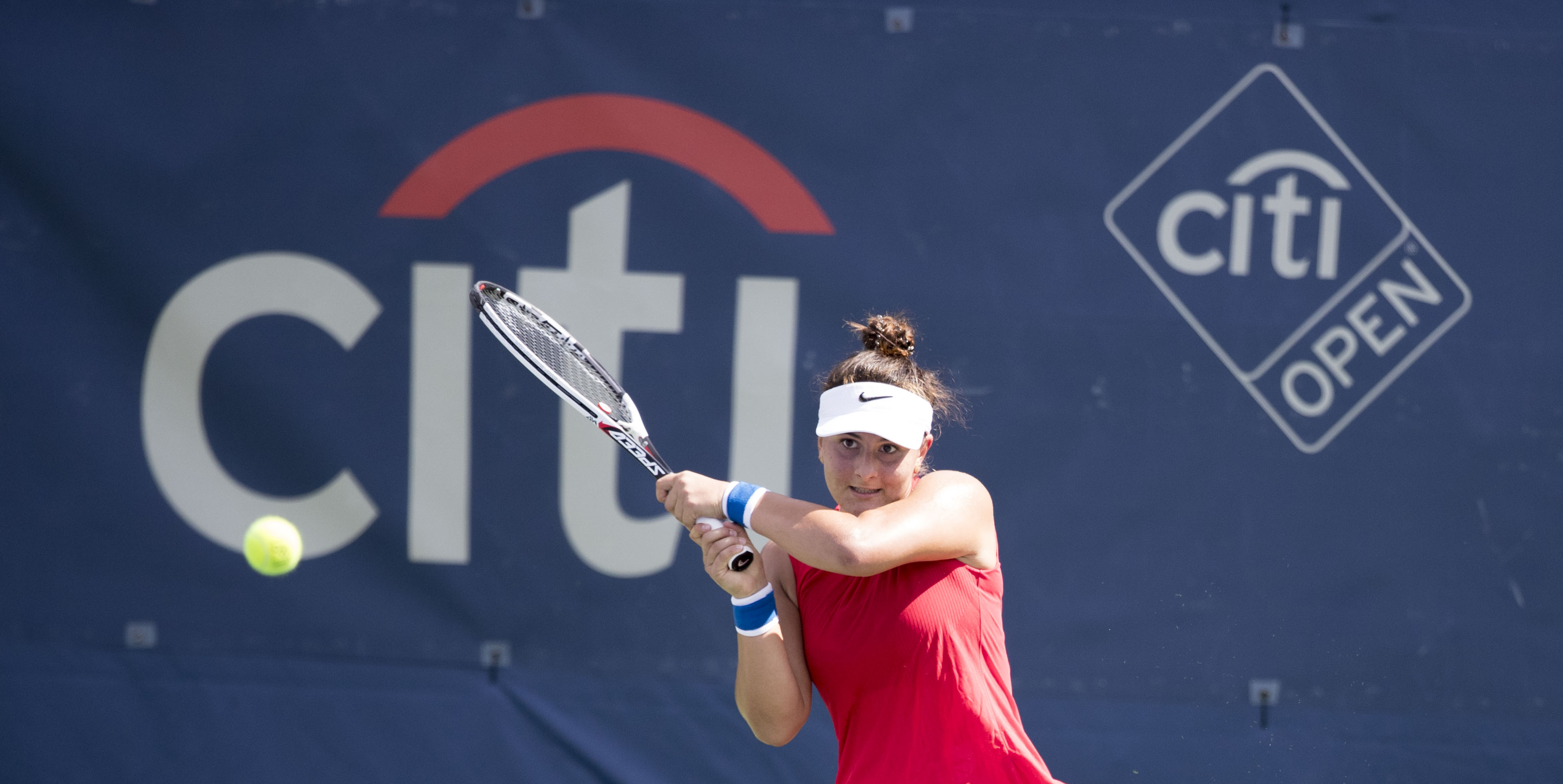 Citi Open Tennis 2017